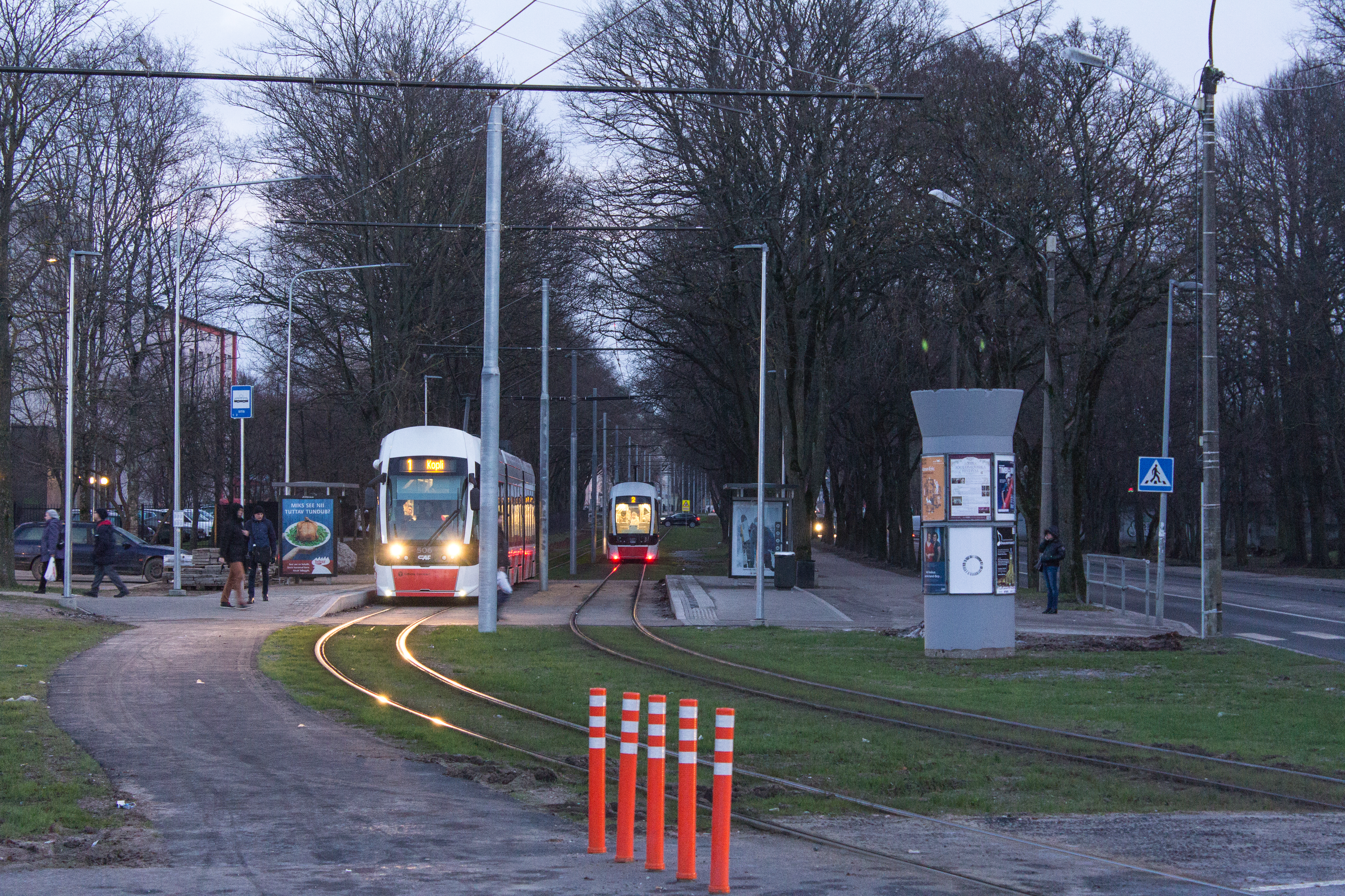 Sitsi trammipeatus (Kopli tänav)